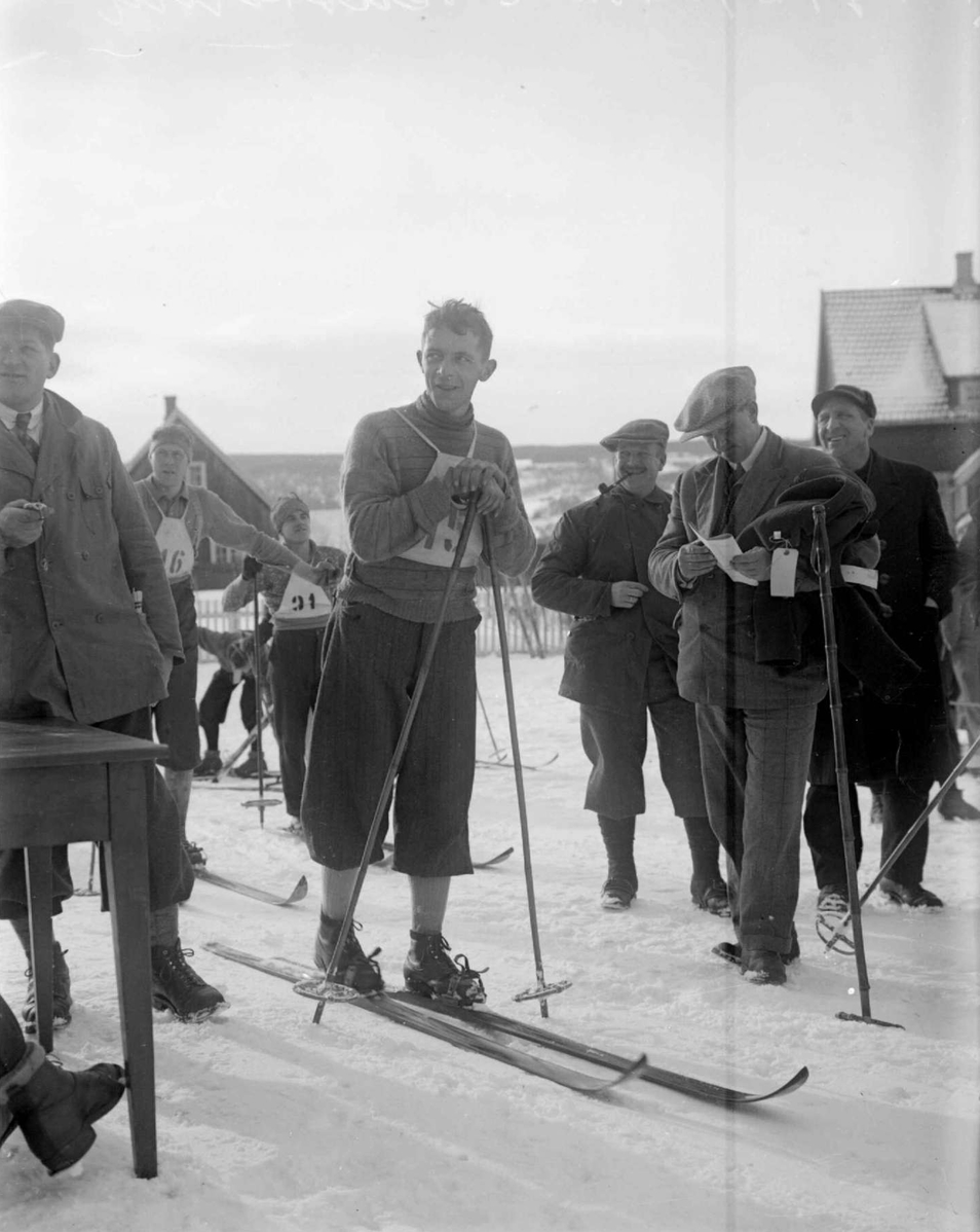 Kaare Busterud Lillehammerrennet 1934